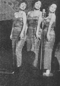 初代スリー・キャッツ 週刊平凡 1960年2月17日号